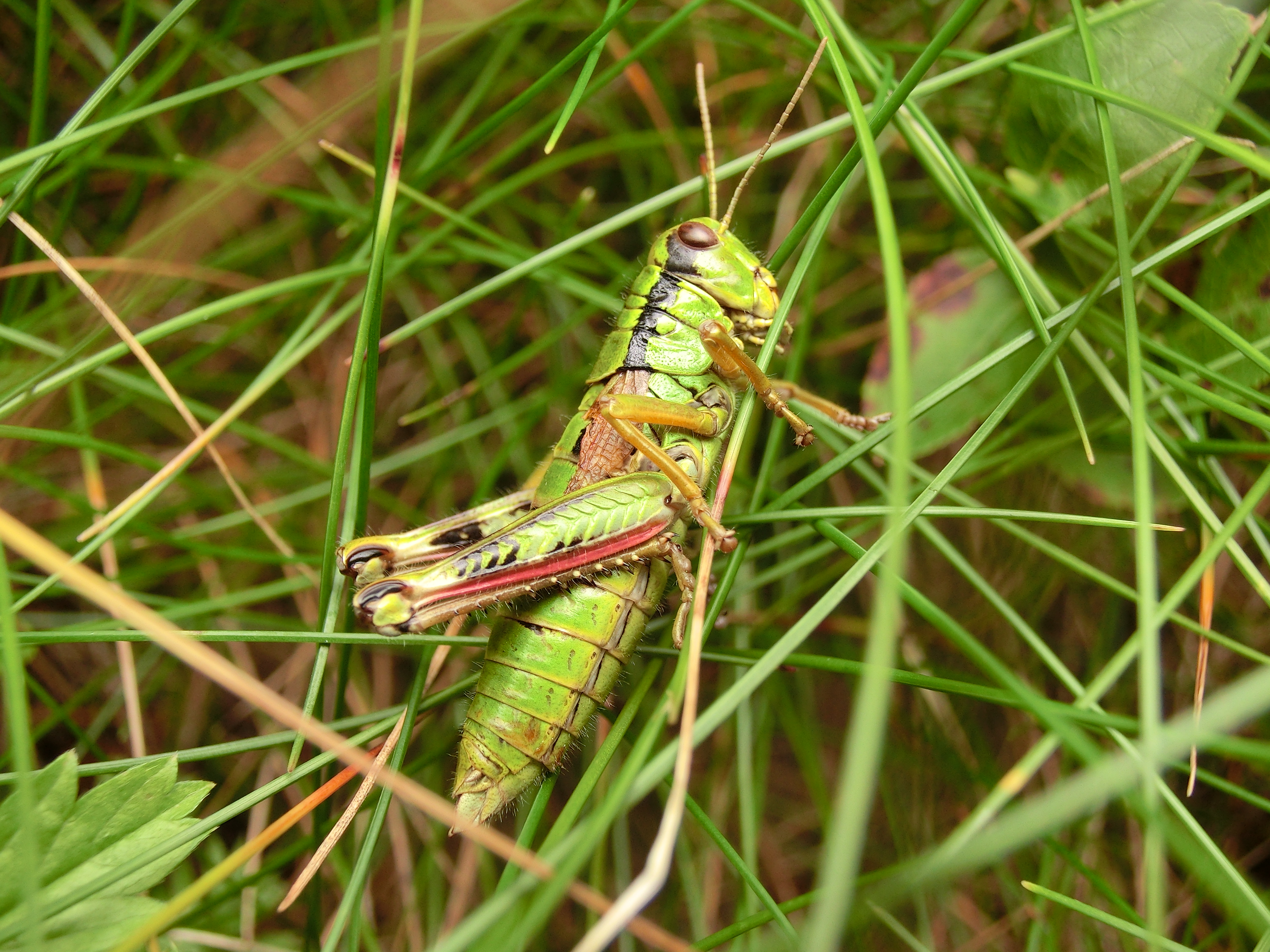 saranče horská